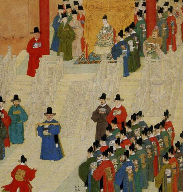 中文（香港）: 徐顯卿宦跡圖上朝情景